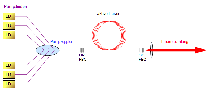 Aufbau eines Faserlasers. Pumpstrahlungseinkopplung durch einen Faserkoppler.